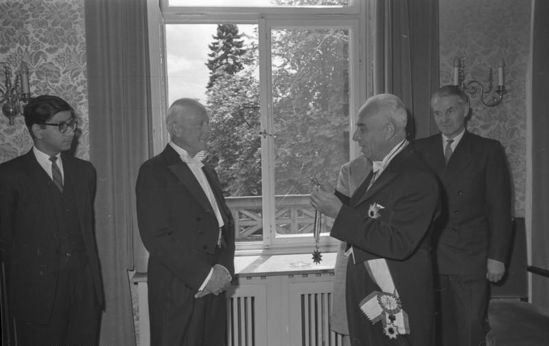 Ordensverleihung an Dr. Wilhelm Vocke in der pakistanischen Botschaft. Verliehen wurde der höchste an Ausländer vergebene Orden "Helal-e-Pakistan".